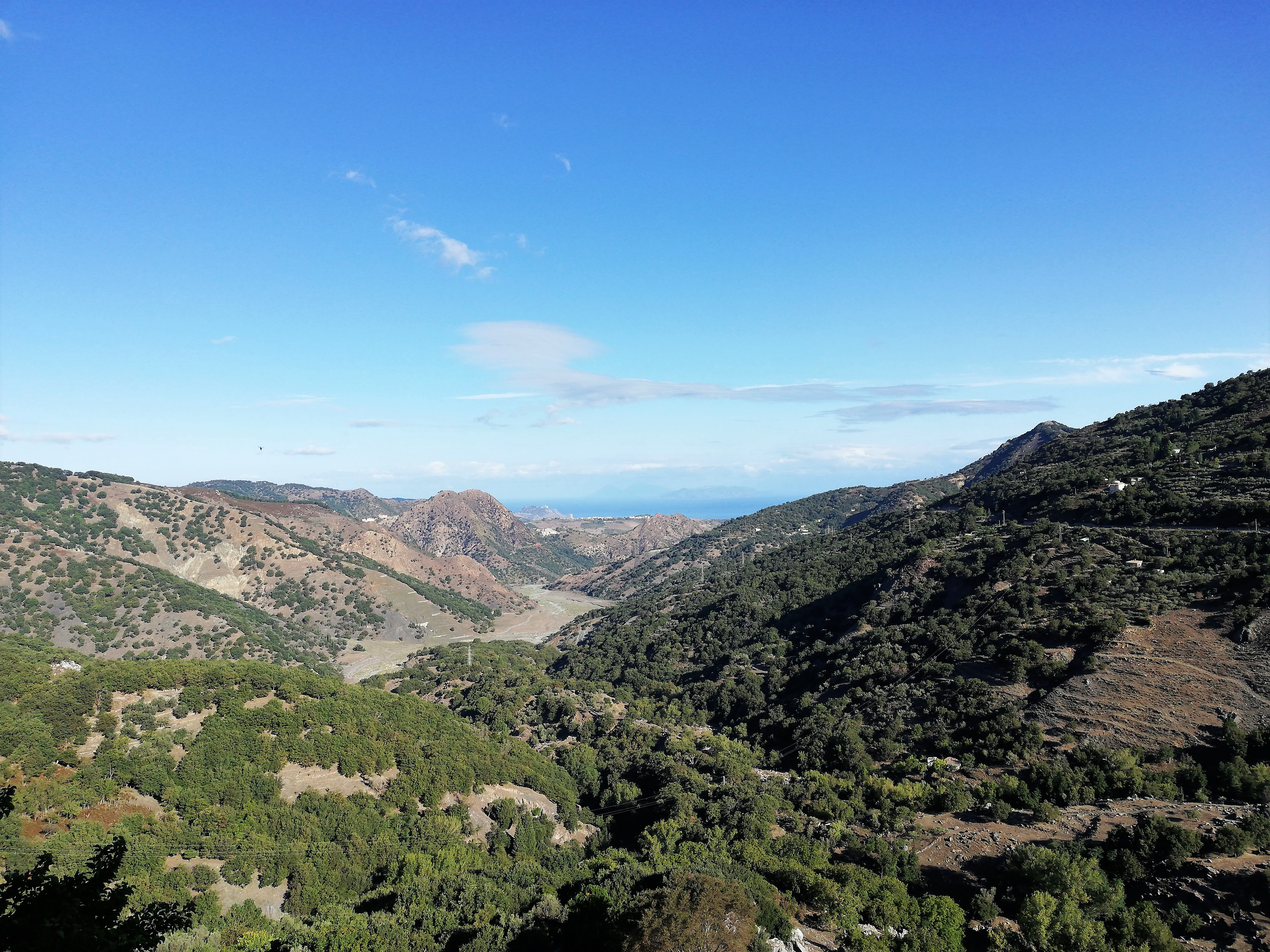 Valle Torrente Mazzarrà. Allineamento del castello di Novara, Castello di Tripi e Santuario Fortezza di Tindari.